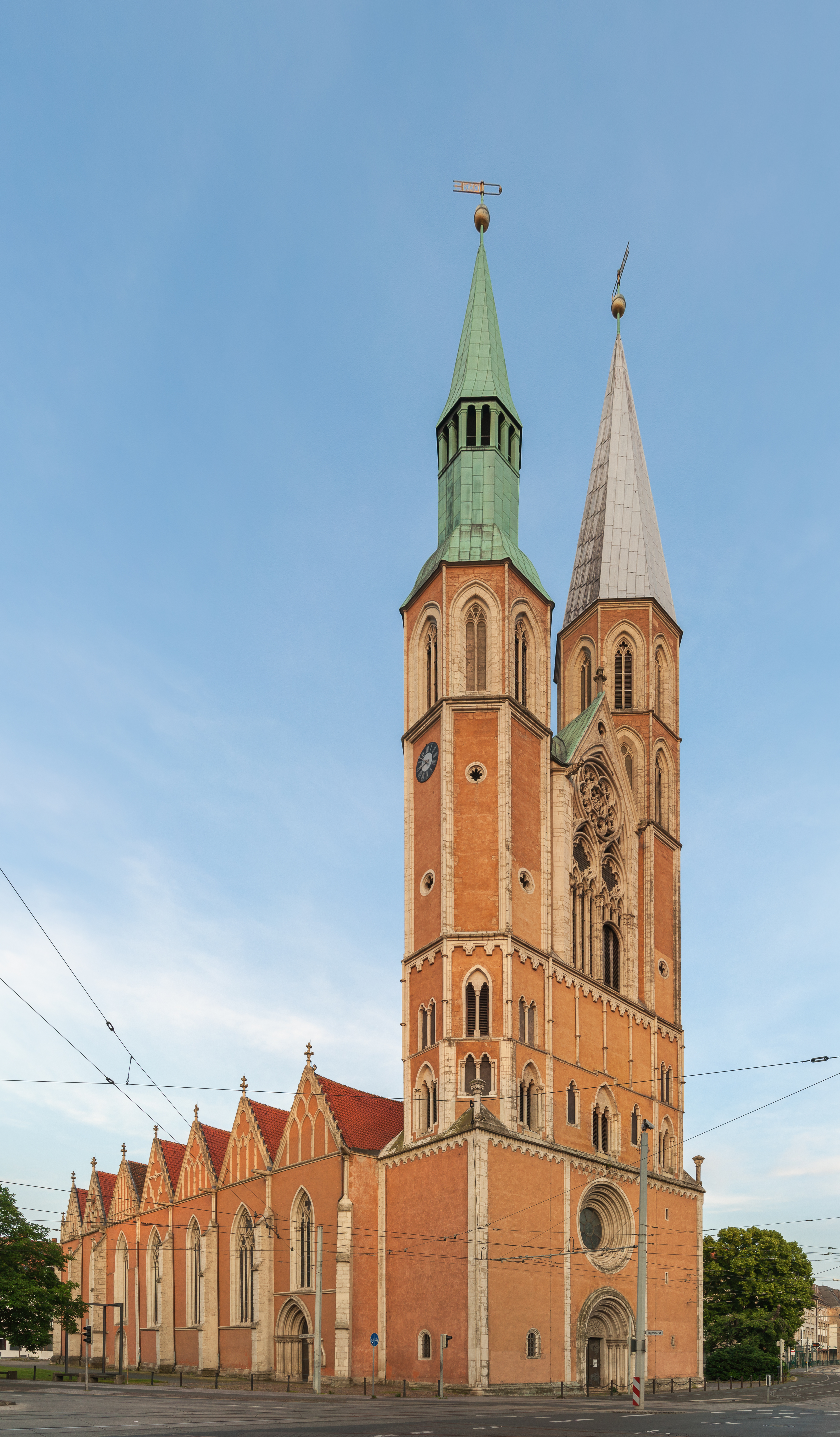 Westwerk und Türme der Katharinenkirche in Braunschweig, Ansicht von Nordwest, Niedersachsen/Deutschland..